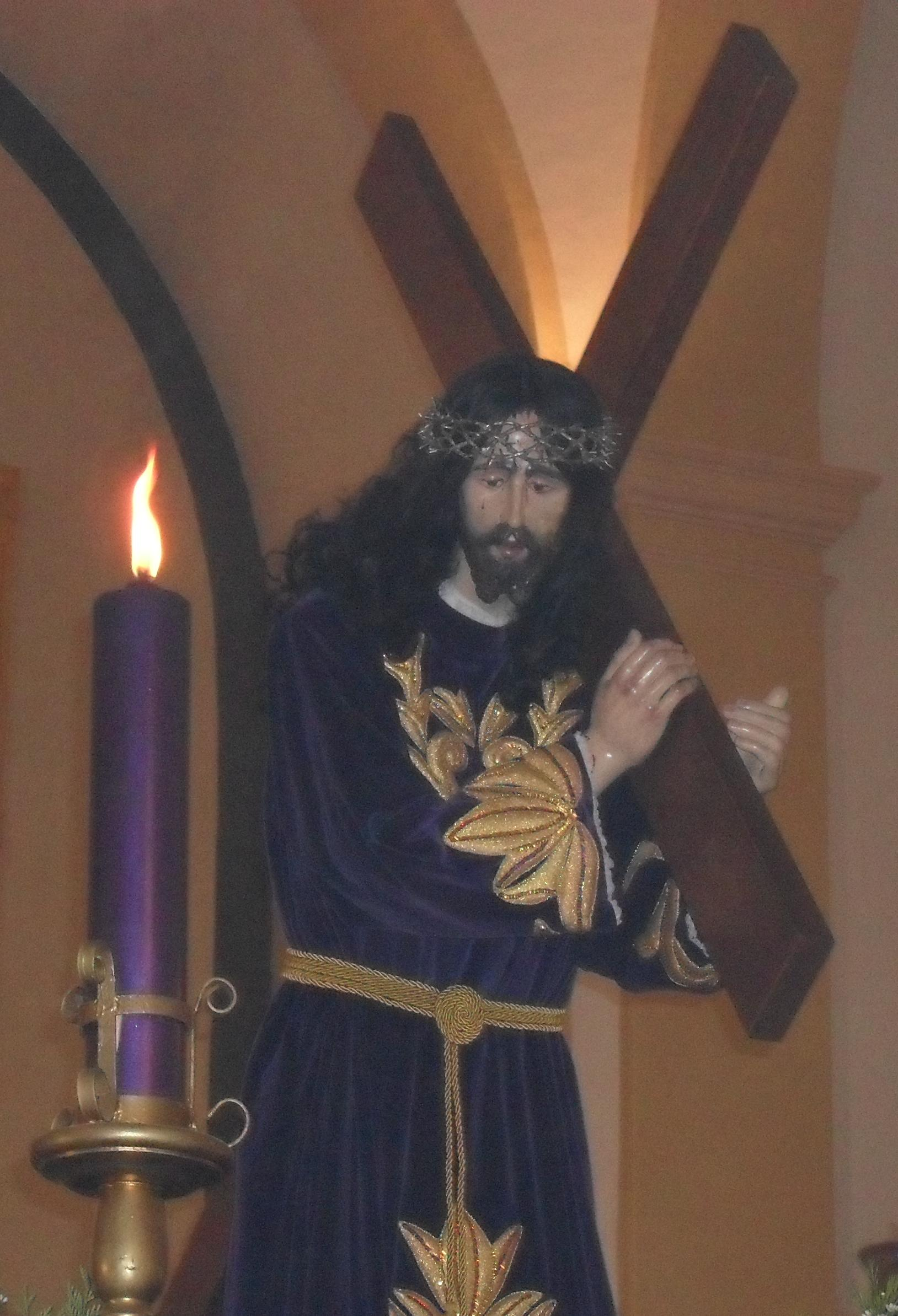 Imagen de Nuestro Padre Jesús Nazareno, llamado cariñosamente "el nazareno". Es procesionado por la hermandad roquetera de Ntra. Sra. de los Dolores.